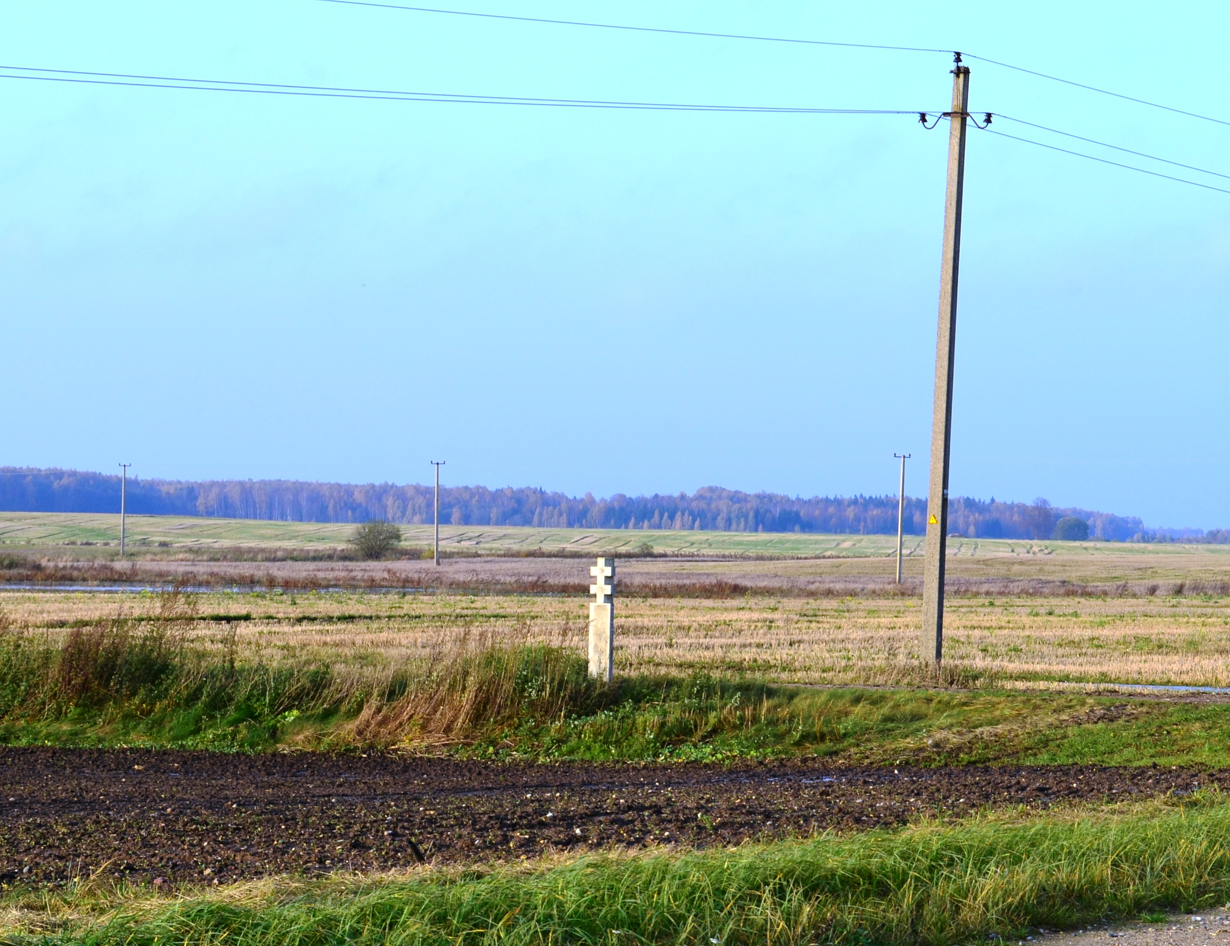 Maulių apylinkėse žuvusių partizanų atminimo ženklas, Kėdainių raj.